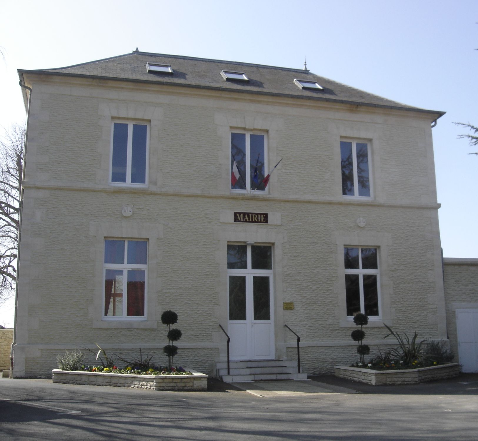 mairie de Saint-Aubin-d'Arquenay